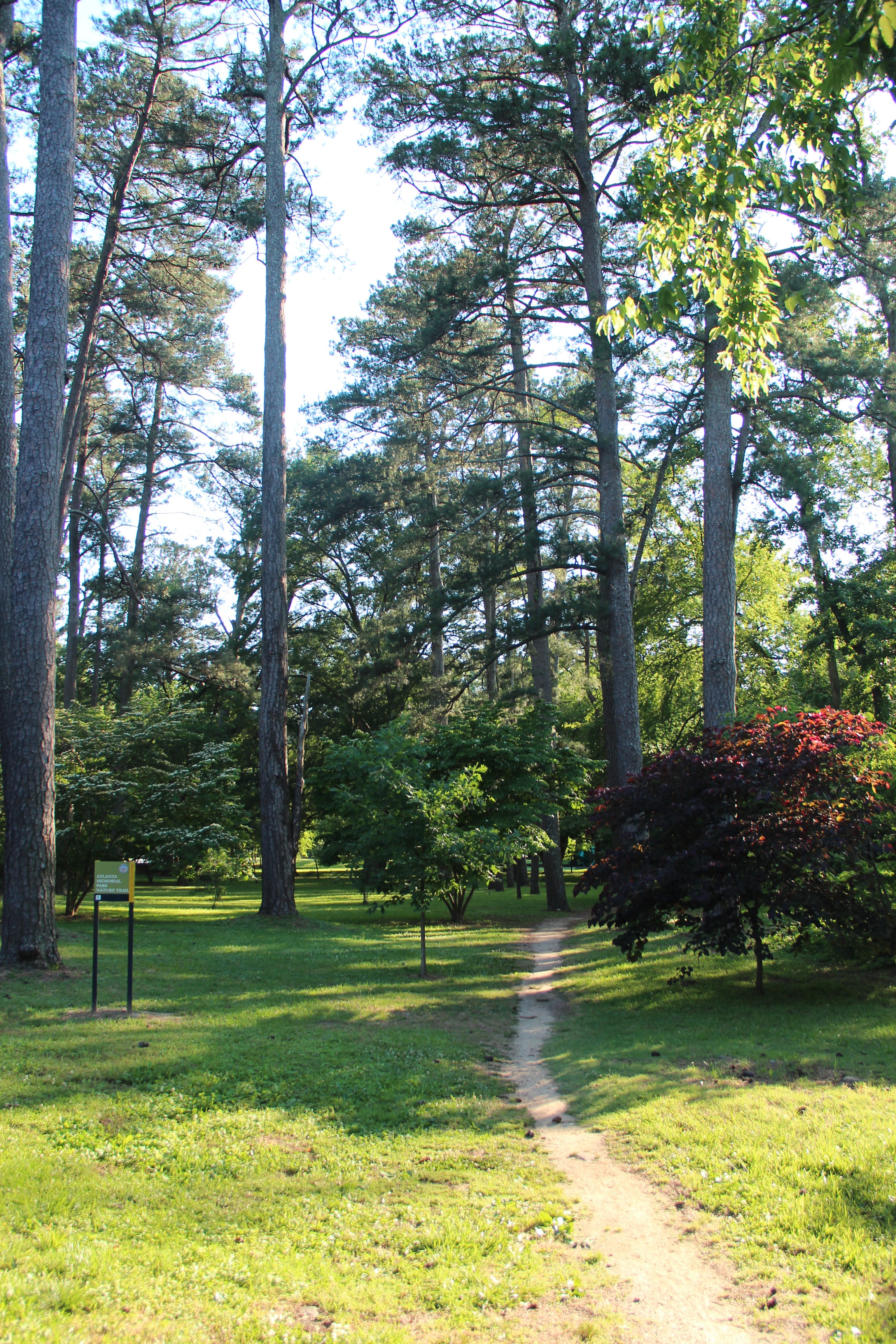 Atlanta Memorial Park